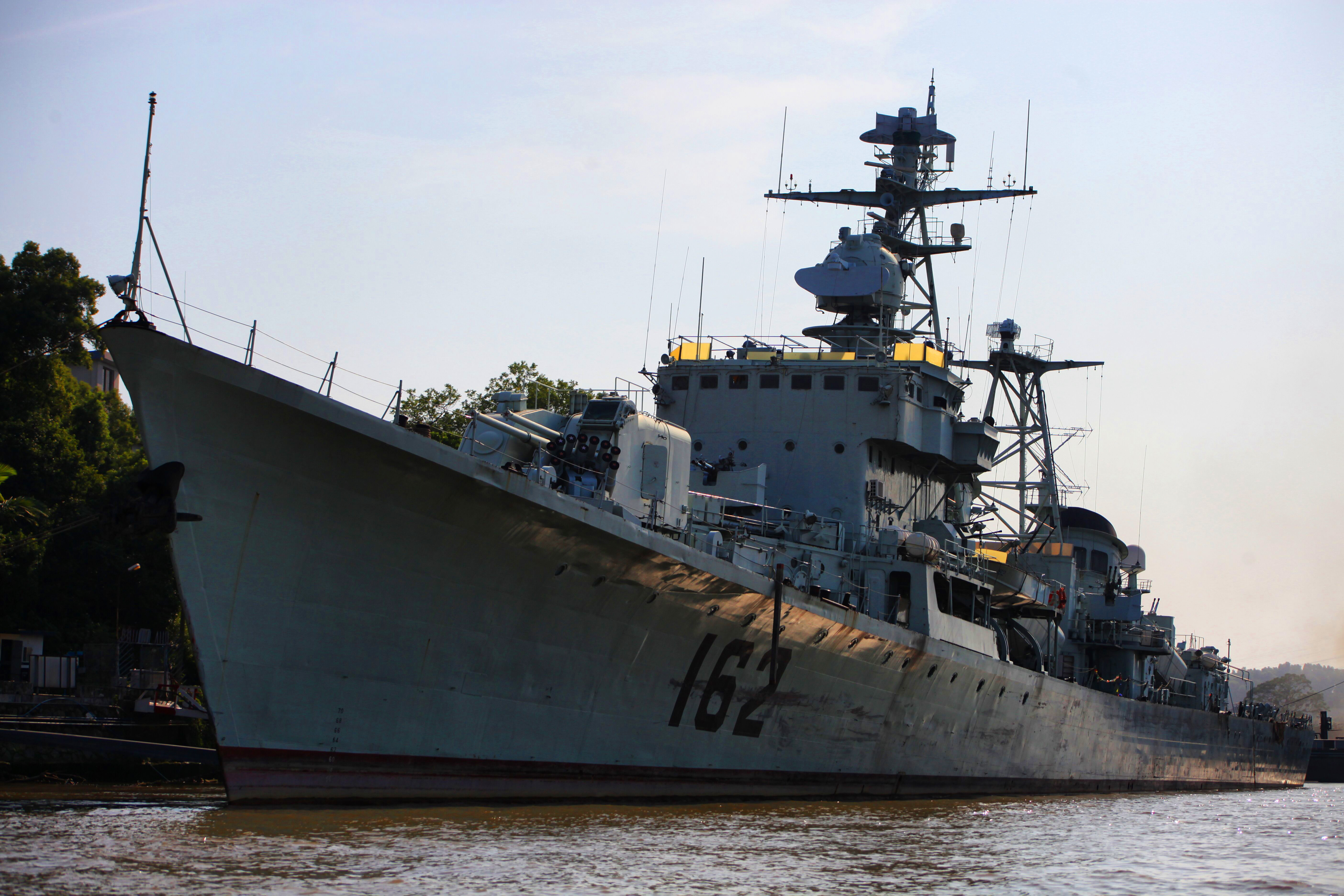 中文（中国大陆）: 停靠在黄埔某码头的“南宁”号导弹驱逐舰。